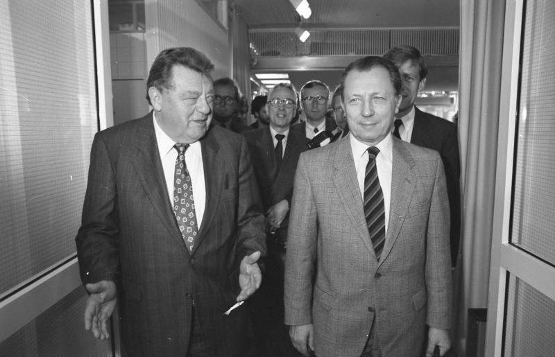 19.5.1988 Die Regierungschefs der 11 Bundesländer der Bundesrepublik Deutschland führten mit dem Präsidenten der EG-Kommission Jacques Delors, Gespräche über die Zusammenarbeit zwischen den Ländern und der Europäischen Gemeinschaft. Die Bundesrepublik Deutschland ist innerhalb Europas der einzige Staat mit einem föderativen System - in der Landesvertretung Bayern